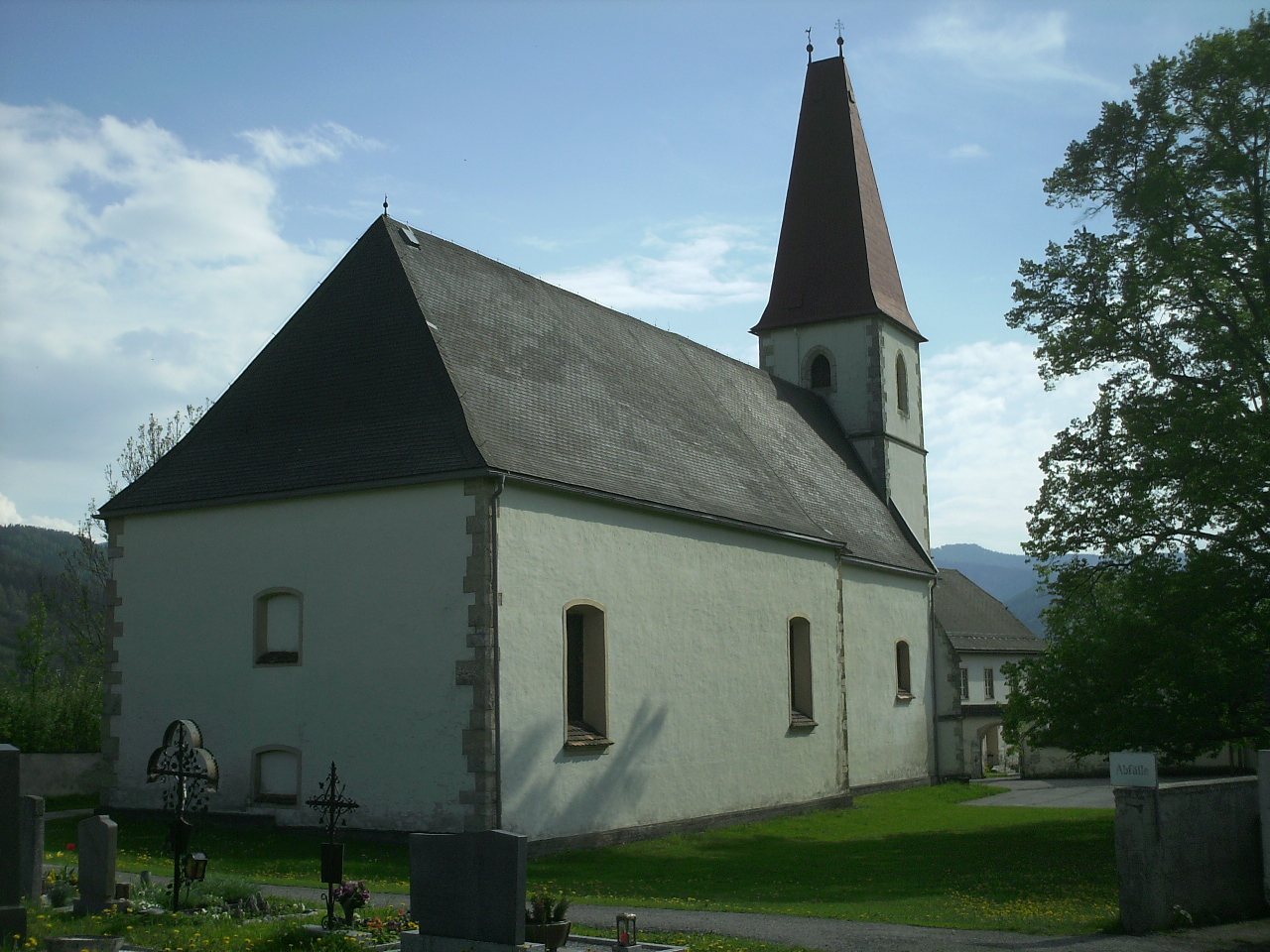 Kath. Pfarrkirche hl. Jakob der Ältere in Turnau